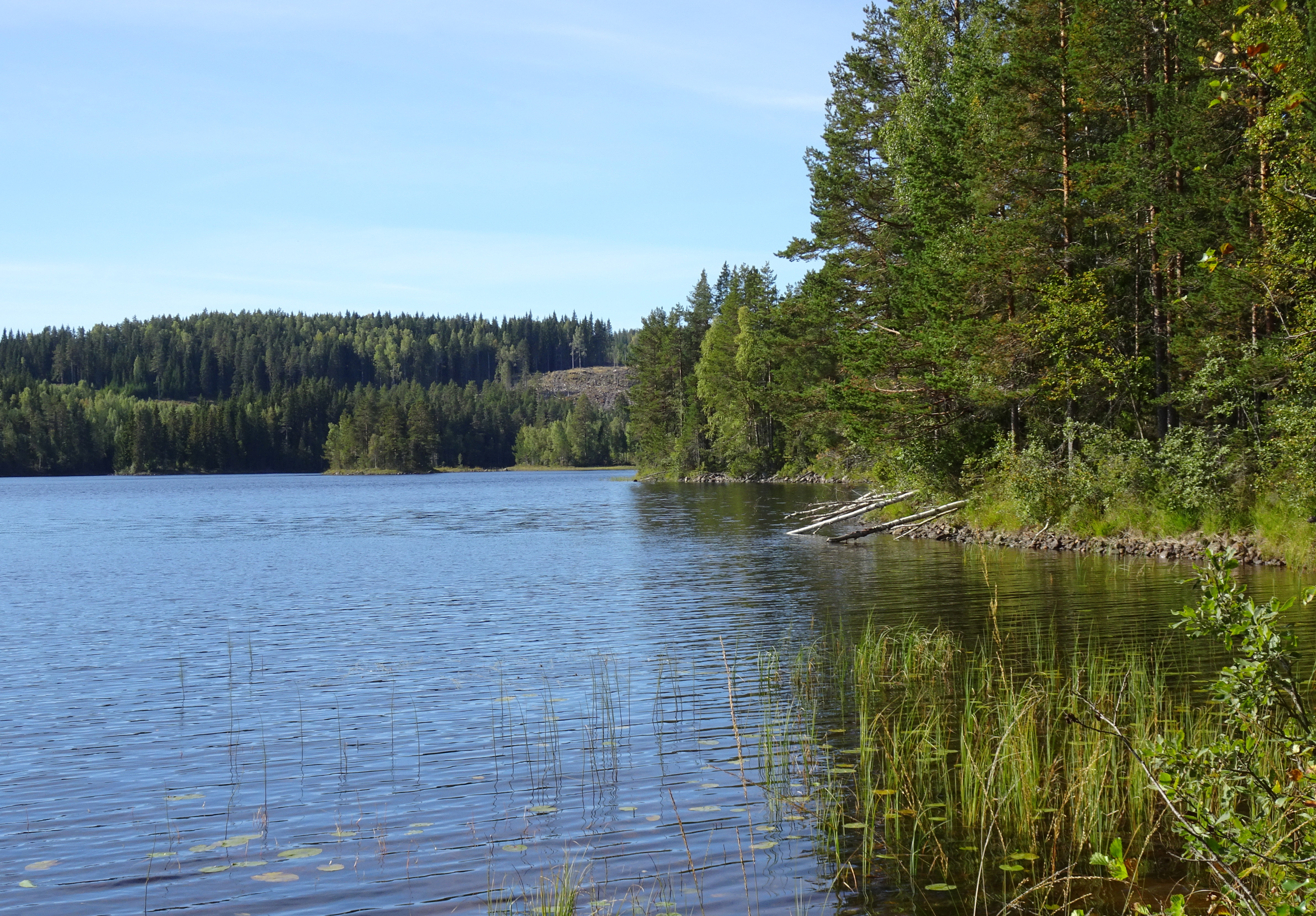 Laxsjö-Flatnan vy från norr mot sydväst